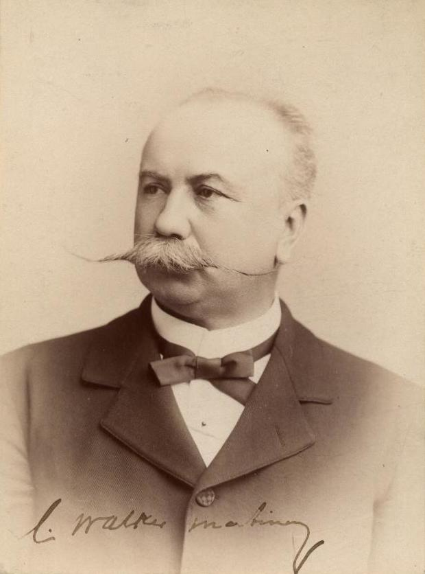 Carlos Walker Martínez (Vallenar, febrero de 1842 - Santiago, 5 de octubre de 1905) fue un escritor, diputado, senador, ministro de estado y abogado chileno.